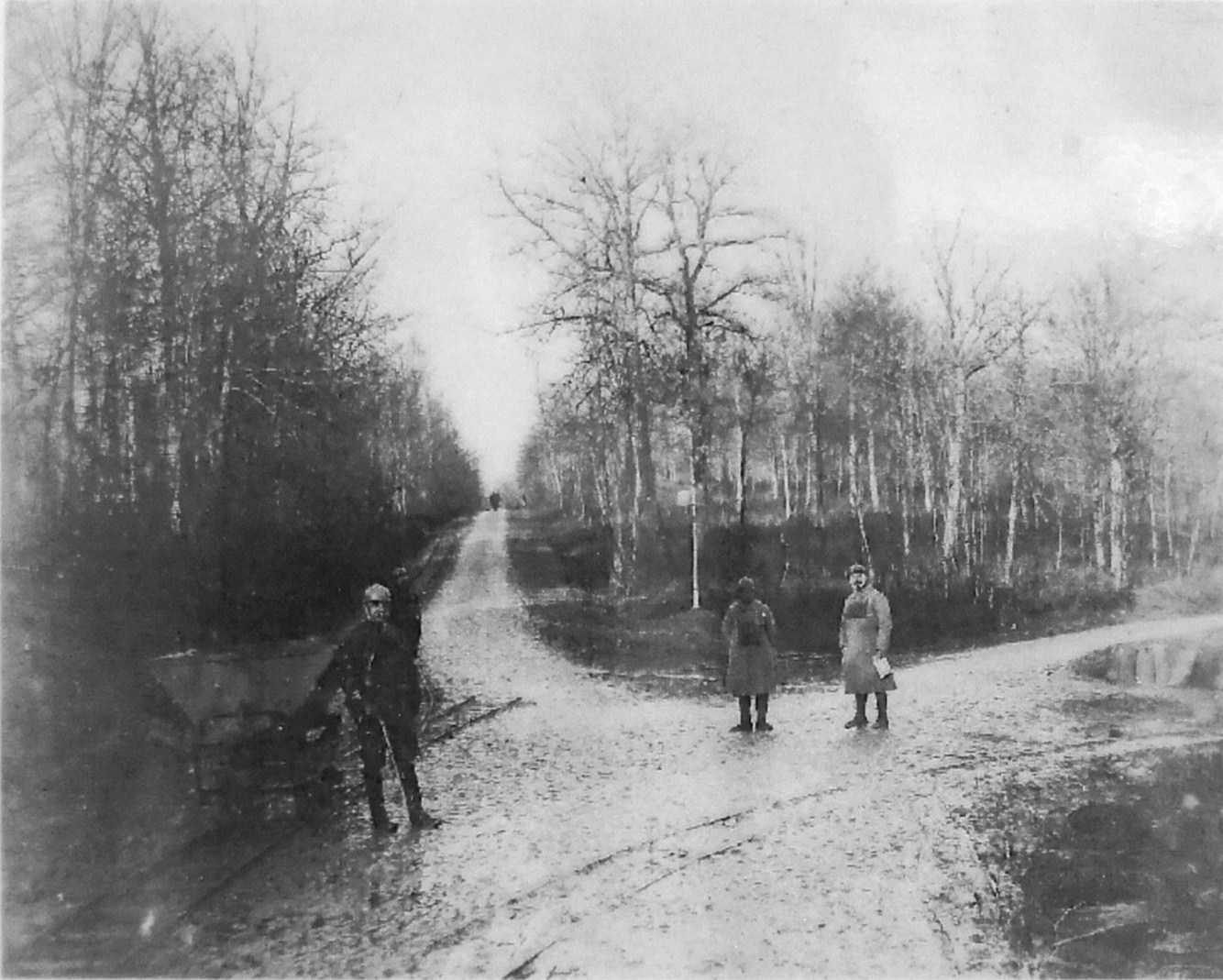 Position au Bois des Caures de Driant avec sa canne devant une voie Decauville qui amenait les charges lourdes . Autorisation des Amis du Musée Emile Driant .